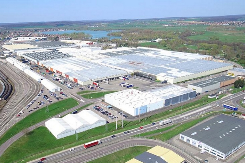 PSA Vesoul - zone nord